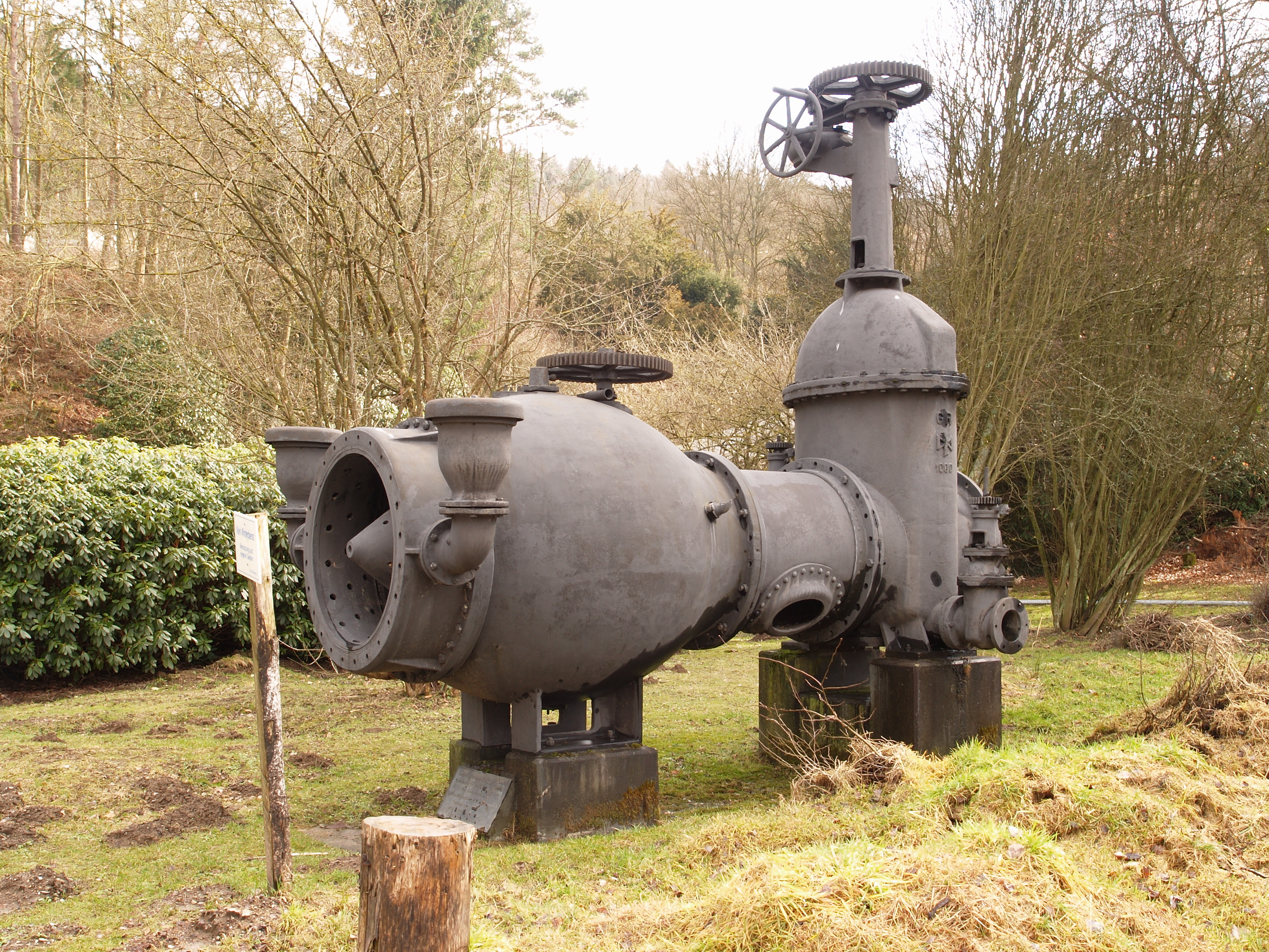 Der Sauerlandstammtisch besichtigt die Sorpetalsperre, ausgebautes Ventil